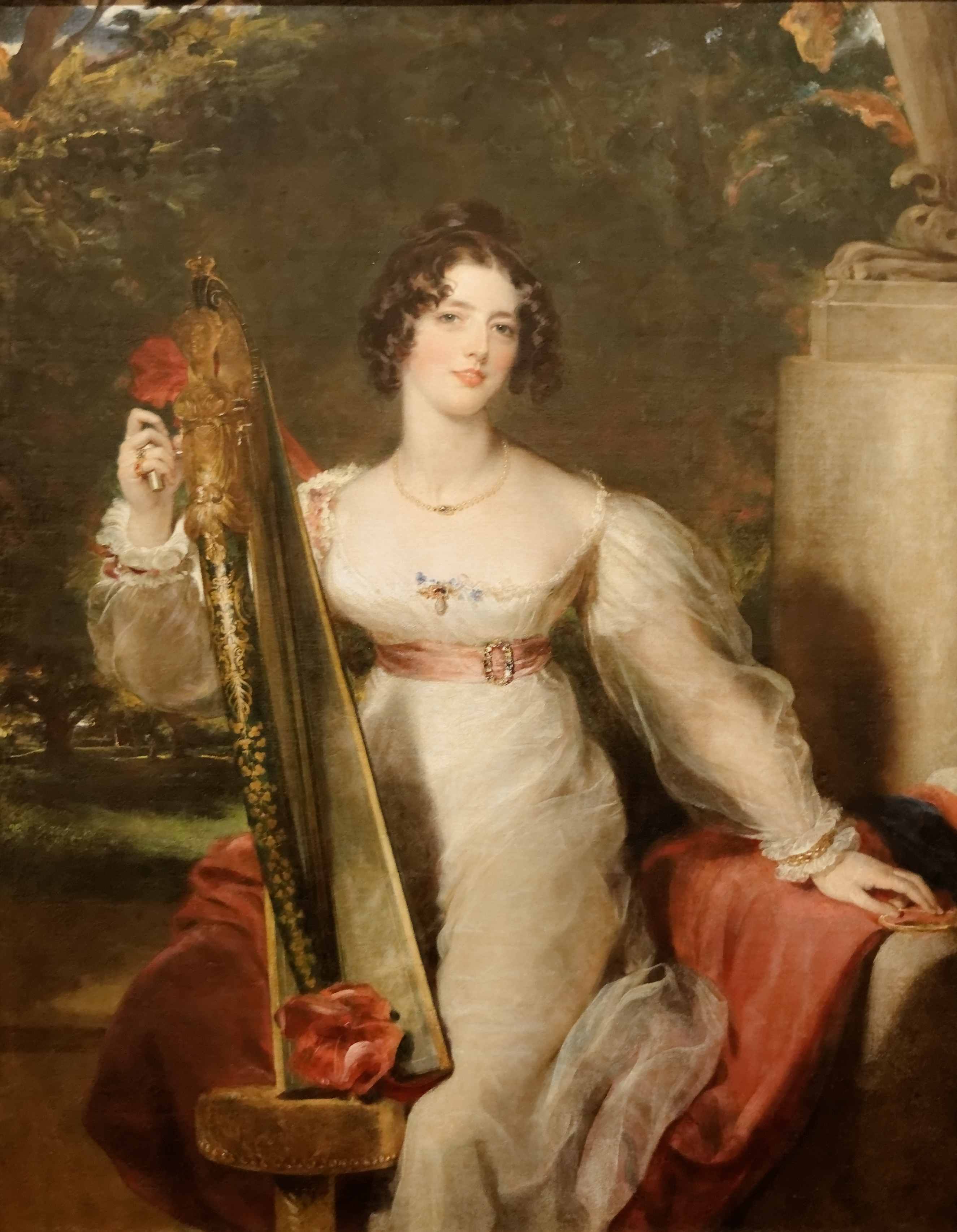 Portrait de Lady Elizabeth Conyngham, Marchioness Conyngham. She married Lord Strathavon (eldest son of the 5th Earl of Aboyne), who became Earl of Aboyne in 1836 when his father became Marquess of Huntley. She died before her father-in-law, so was never Marchioness of Huntly, remaining Countess of Aboyne. This portrait of Lady Elizabeth Conyngham is frequently misidentified as one of her mother, who would have been more than 50 years old (and was Countess Conyngham) when it was painted. It is also sometimes confused with another painting in the Calouste Gulbenkian by Gainsborough, of Mrs. Lowndes-Stone.